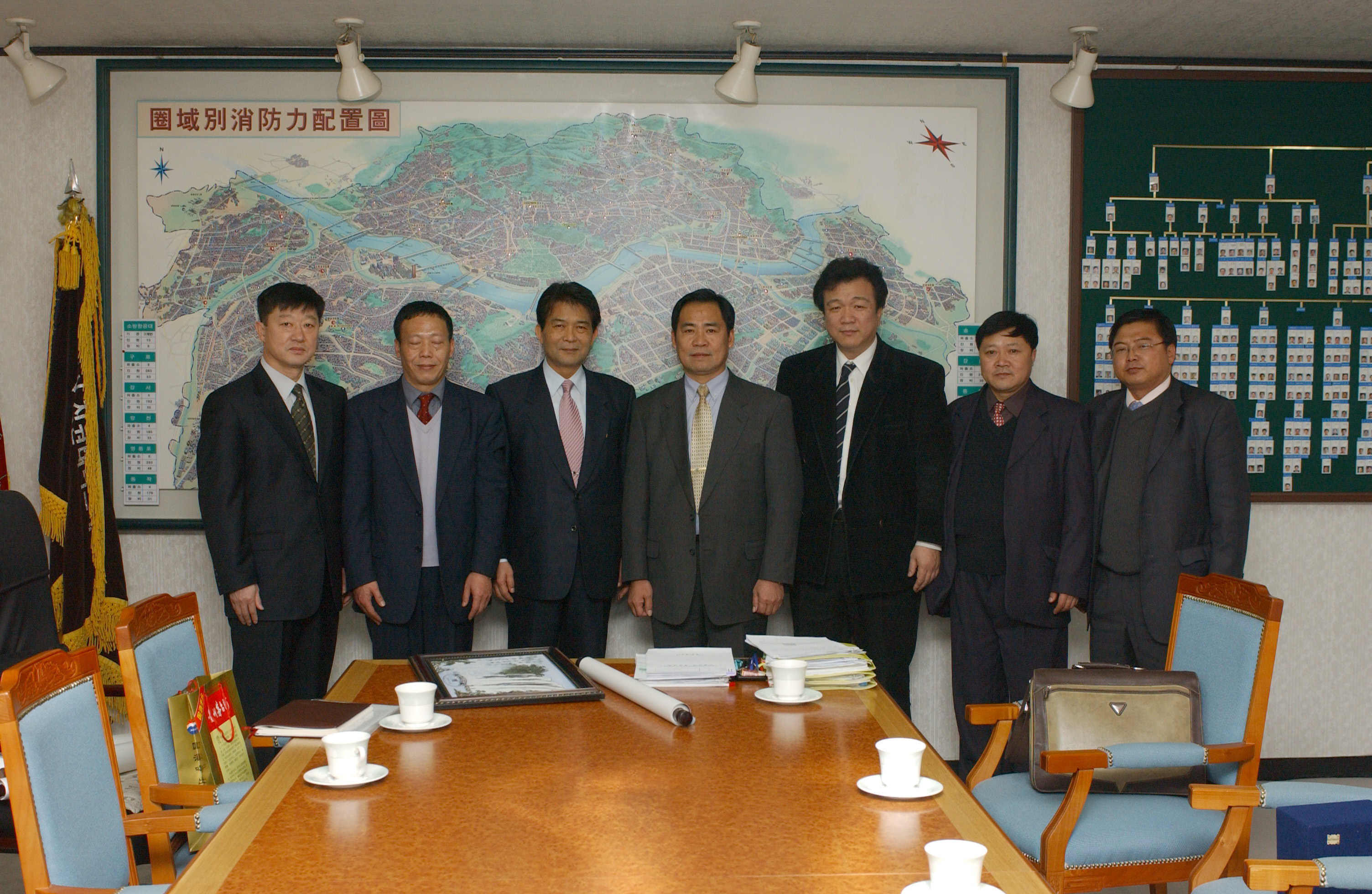 2005년 1월 서울특별시 중구 서울소방재난본부 중국 귀주성 소방국장 방문